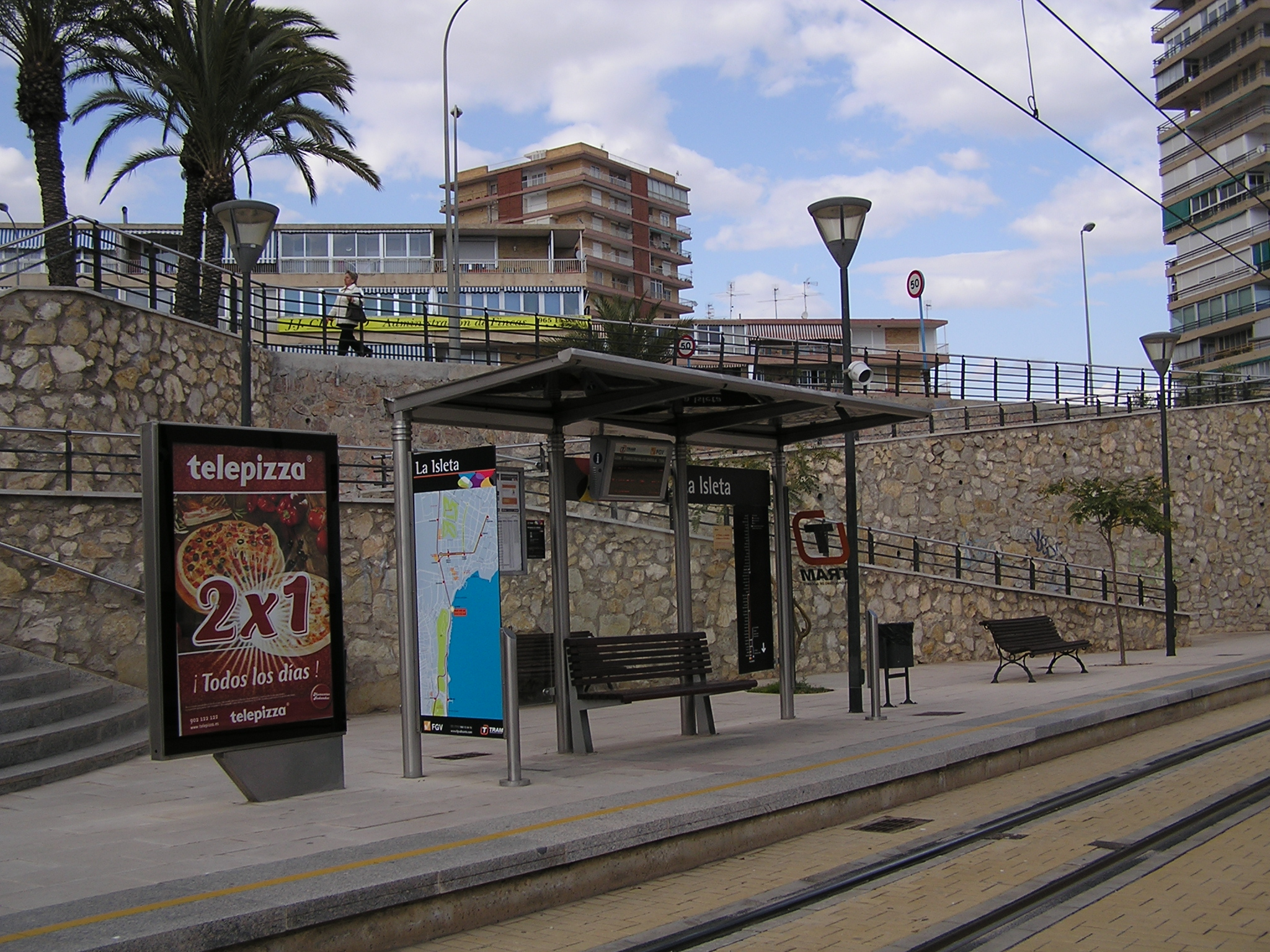 La Isleta. Tram Stop. Alicante Tram.